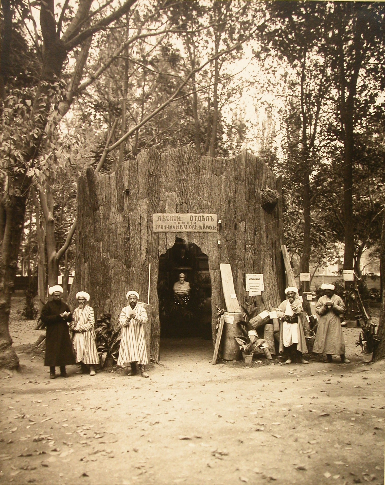 Памятник Краузе Иеронима Ивановича 1909 Ташкент